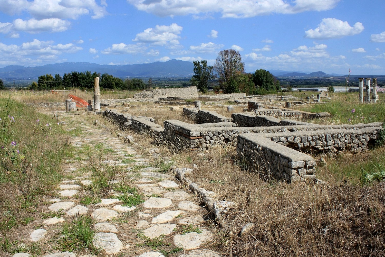 Lucus Feroniae (Italie). Vue du site archéologique. Vue de la via capena en direction du forum.